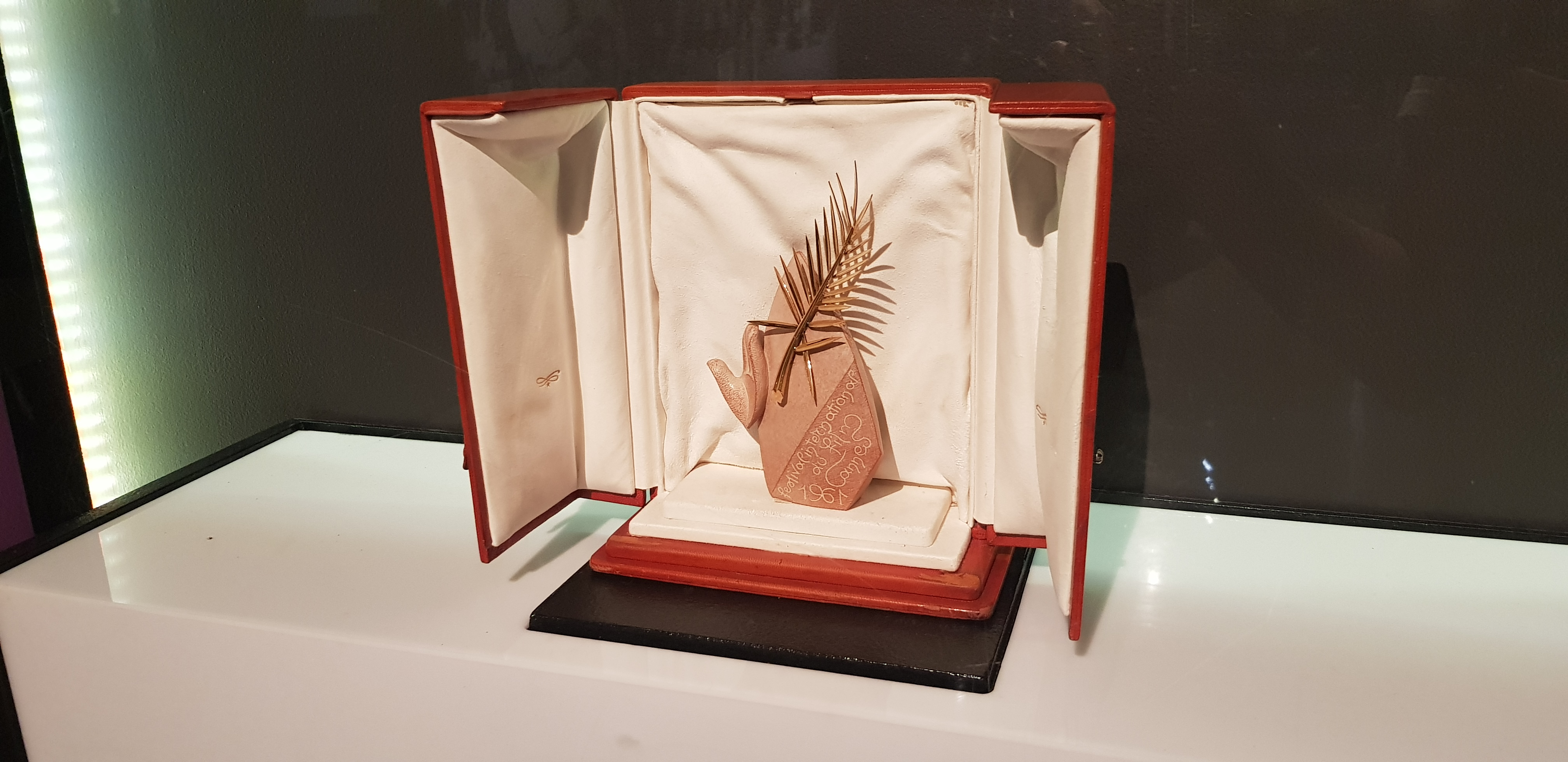 Palme D'Or otorgado a la película "Viridiana" (1961) del director Luis Buñuel.